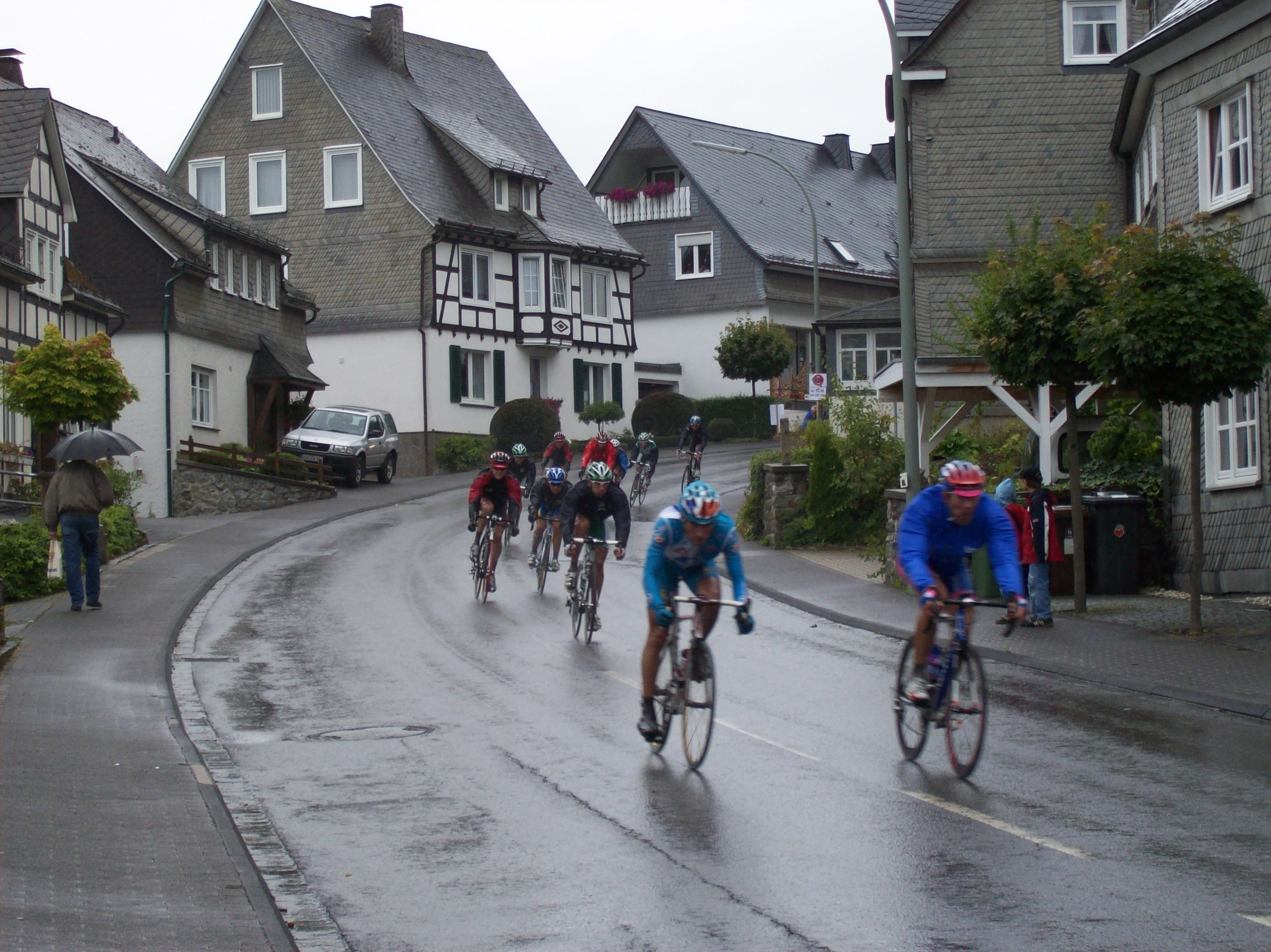 Deutschland Tour 2008 - 5. Etappe nach Winterberg, fotografiert in Schmallenberg